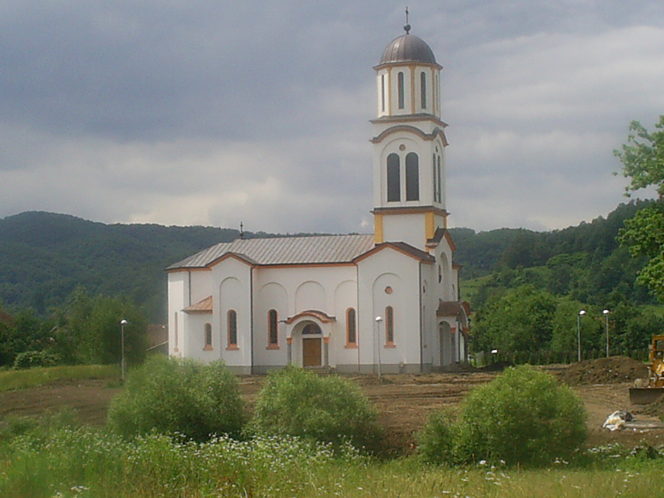 Crkva u Knežicama